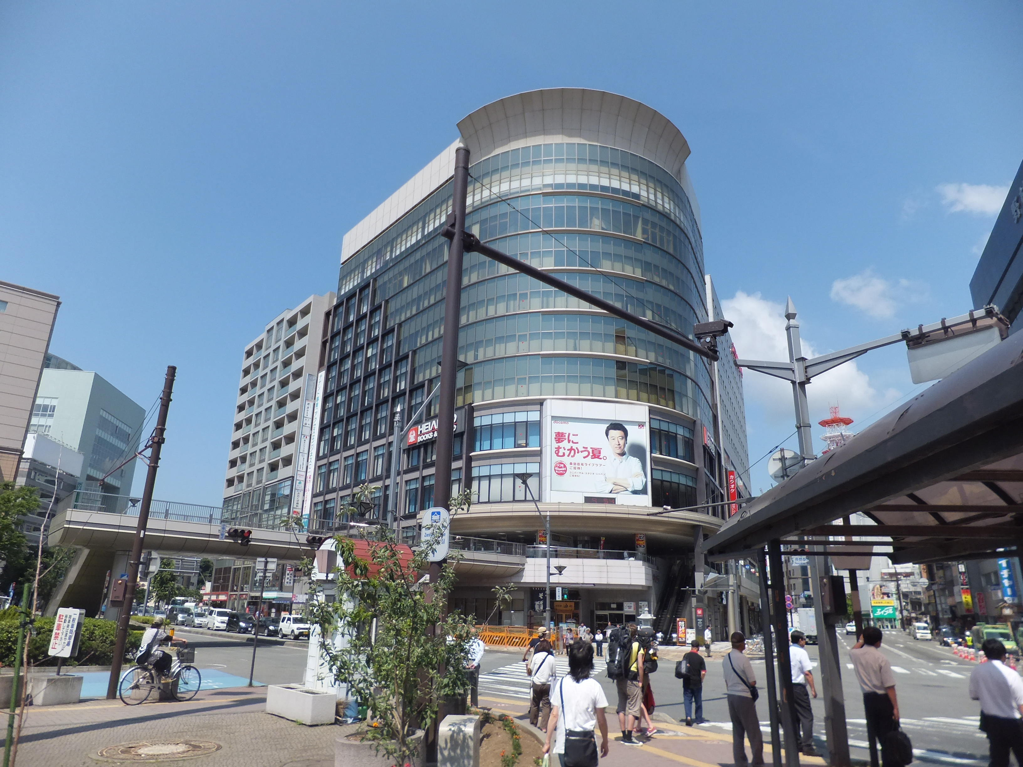 ウェストプラザ長野。長野駅（善光寺口）駅前にある大型商業ビルである。